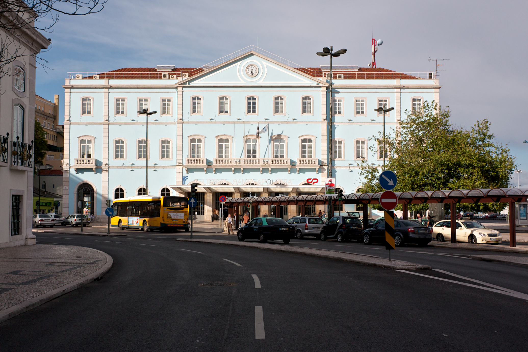 Tipo: E Estação Local: Lisboa [Linha do Norte, PK 0,0] Data e hora: 21 de Abril de 2011 [18h28]